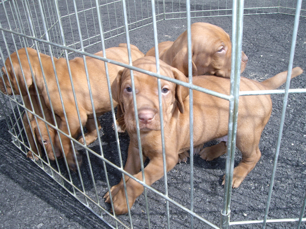 Vizsla puppies.